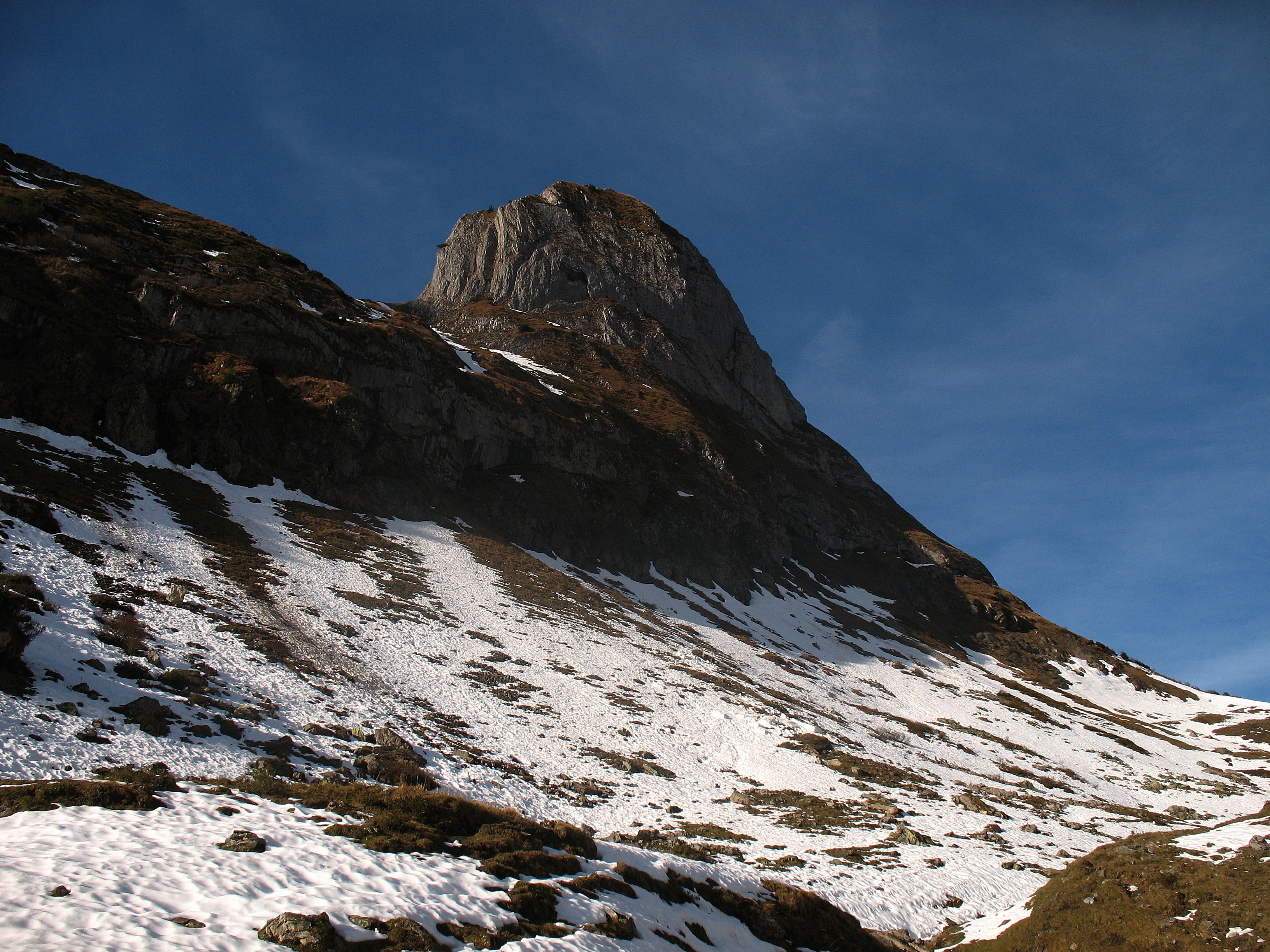 Blick aus Westen auf den Torkopf (1930 m).